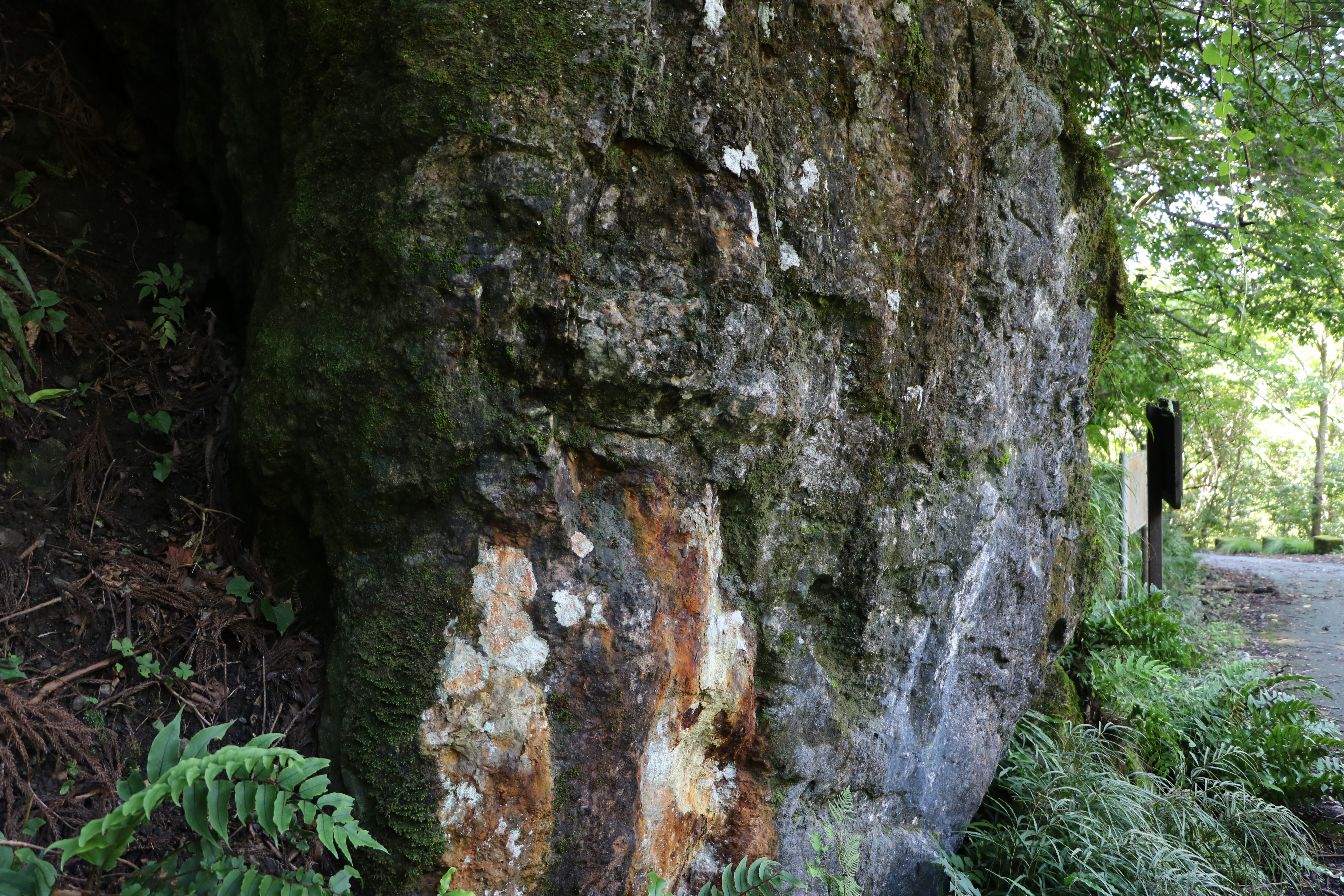 綿向山麓の接触変質地帯（国指定天然記念物、滋賀県蒲生郡日野町）の露頭。